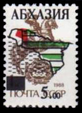 Надпечатка на стандартной марке СССР XIII выпуска, выполненная от имени Абхазии